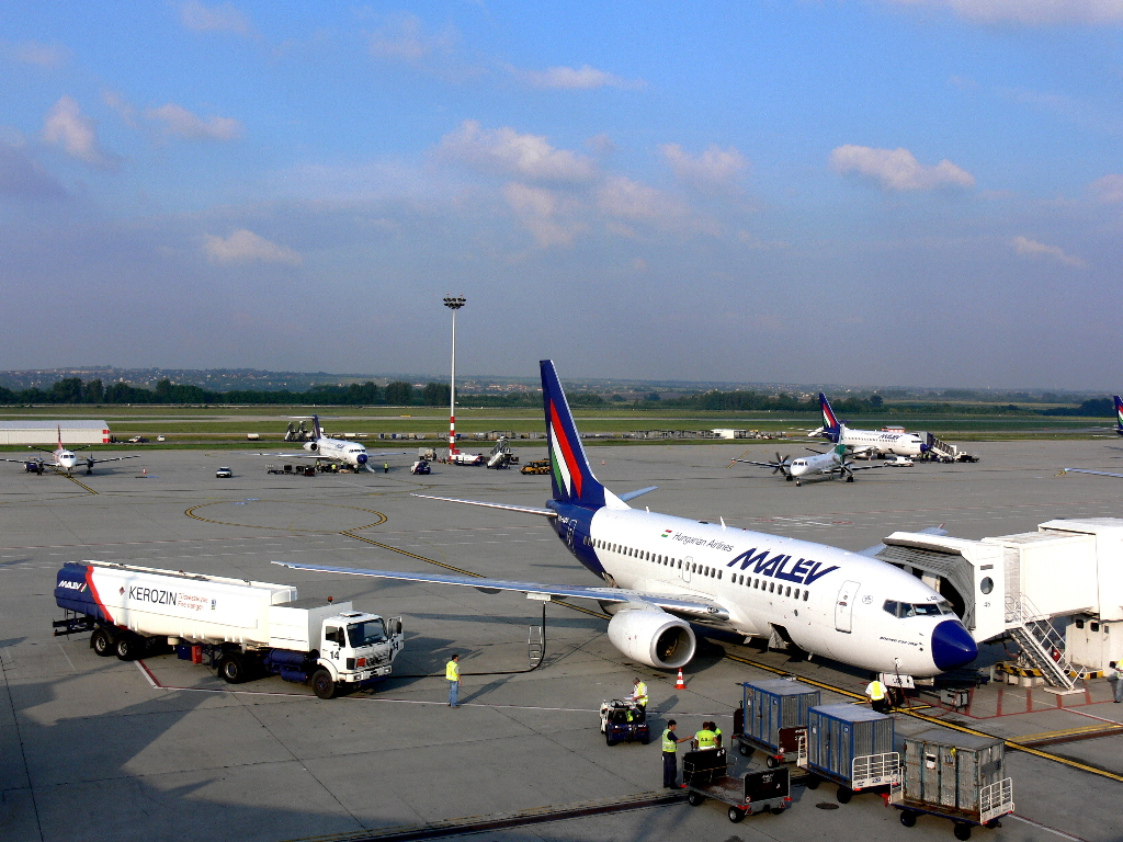 MALÉV Hungarian Airlines Boeing 737-700, Budapest